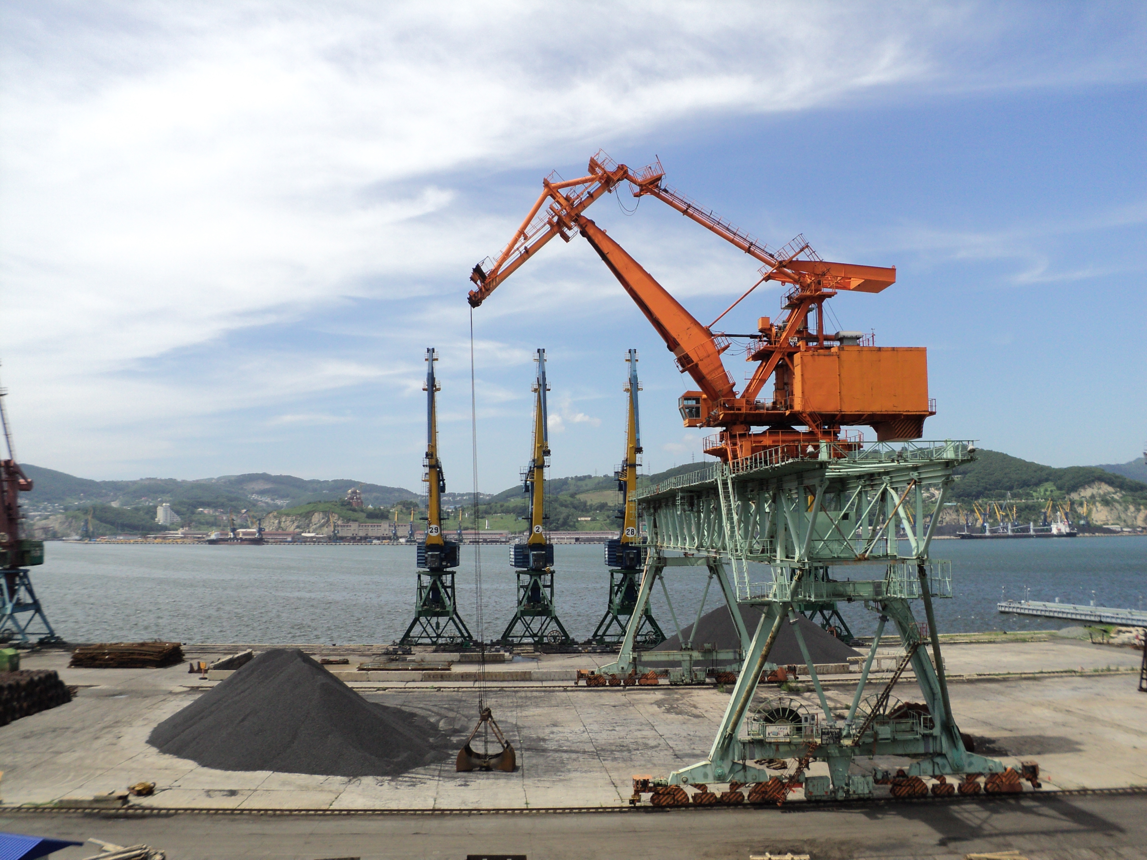 Находкинский торговый порт